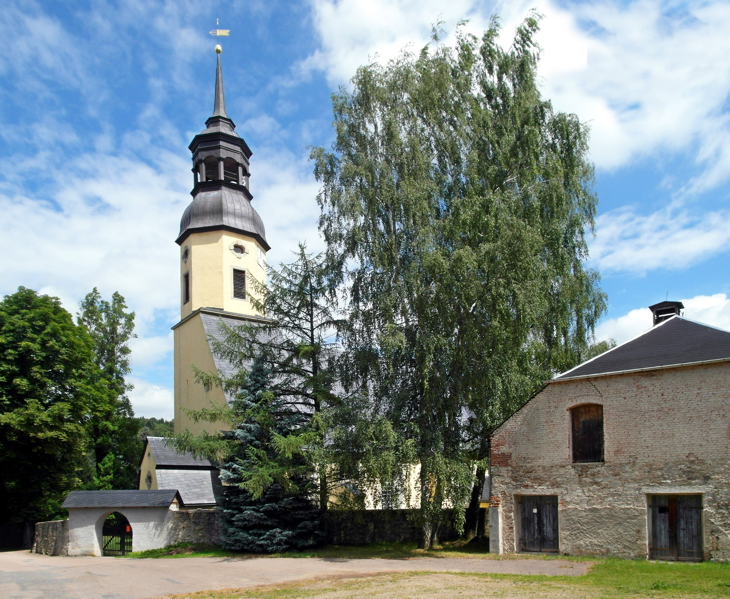 18.07.2016 09619 Dorfchemnitz: Evangelische Dorfkirche Dorfchemnitz, Am Kirchberg. Es ist sicher belegt, daß es 1539 in Dorfchemnitz schon eine Kirche gab. Jedoch ist unbekannt, wie diese aussah. Diese Kirche wurde in den folgenden Jahrhunderten mehrmals umgebaut und vergrößert, bis sie 1893 die Gestalt erhielt, die sie noch heute hat. [SAM7009.JPG]20160718350DR.JPG(c)Blobelt